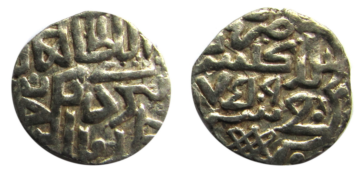 Найден в 2010 году в составе большого клада на территории Воронежской области